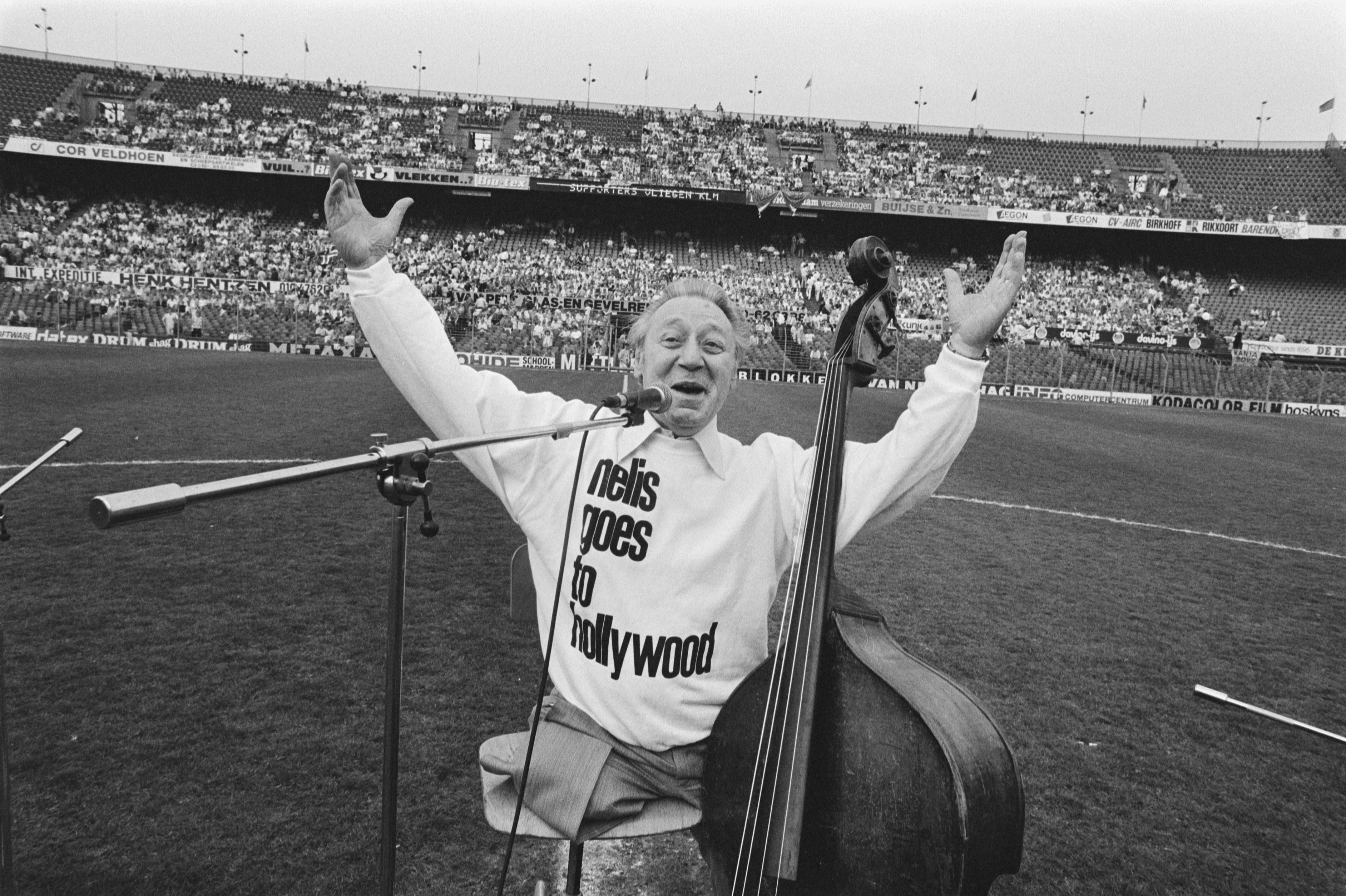 Collectie / Archief : Fotocollectie Anefo Reportage / Serie : [ onbekend ] Beschrijving : Nederland tegen Hongarije 2-0; voor de wedstrijd trad Manke Nelis op Datum : 29 april 1987 Locatie : Hongarije, Nederland Trefwoorden : sport, voetbal Fotograaf : Bogaerts, Rob / Anefo Auteursrechthebbende : Nationaal Archief Materiaalsoort : Negatief (zwart/wit) Nummer archiefinventaris : bekijk toegang 2.24.01.05 Bestanddeelnummer : 933-9662